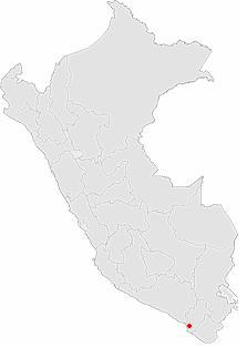 Mapa Ilo